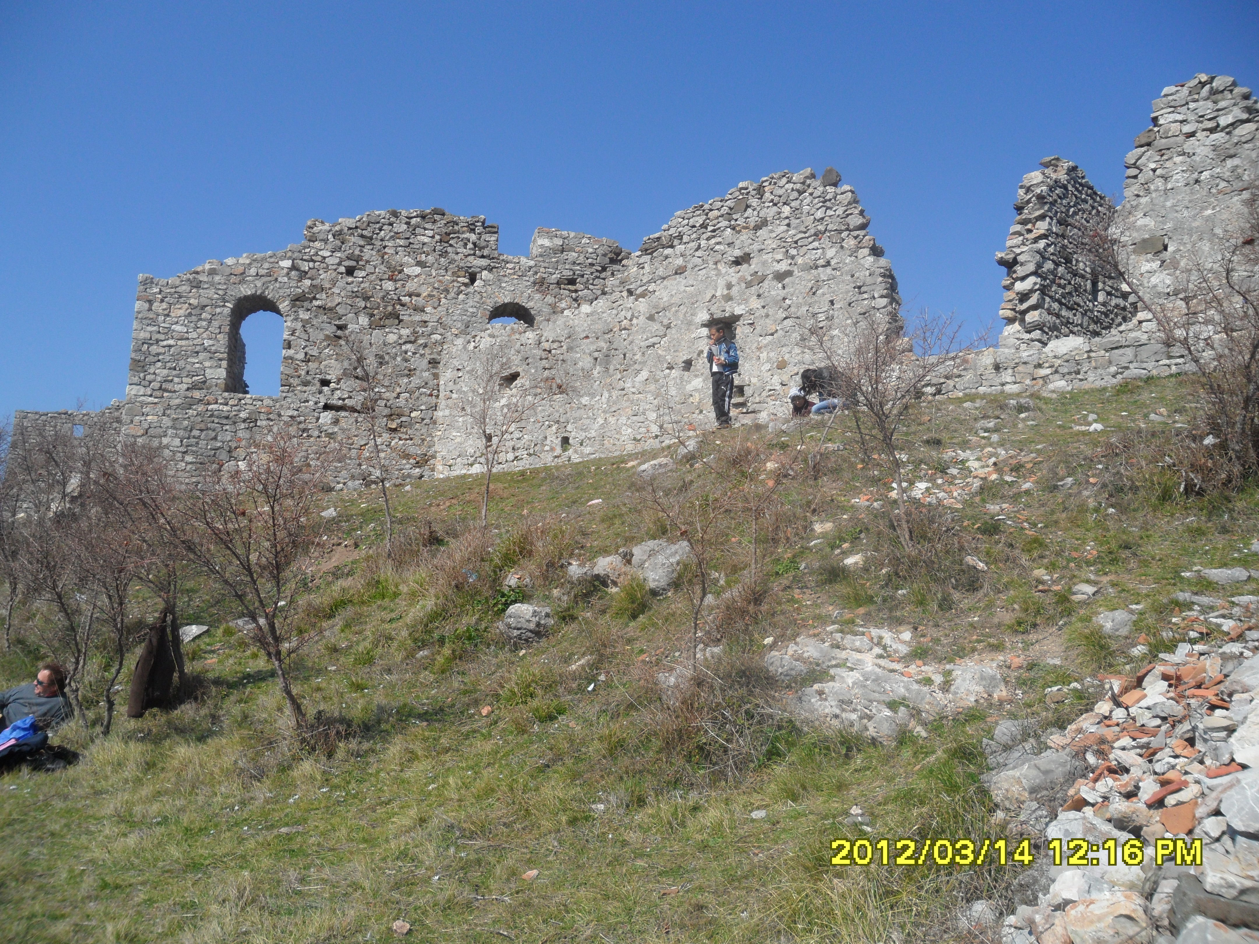 14 Marsi Dita e Veres-- Kalaja e Lezhës